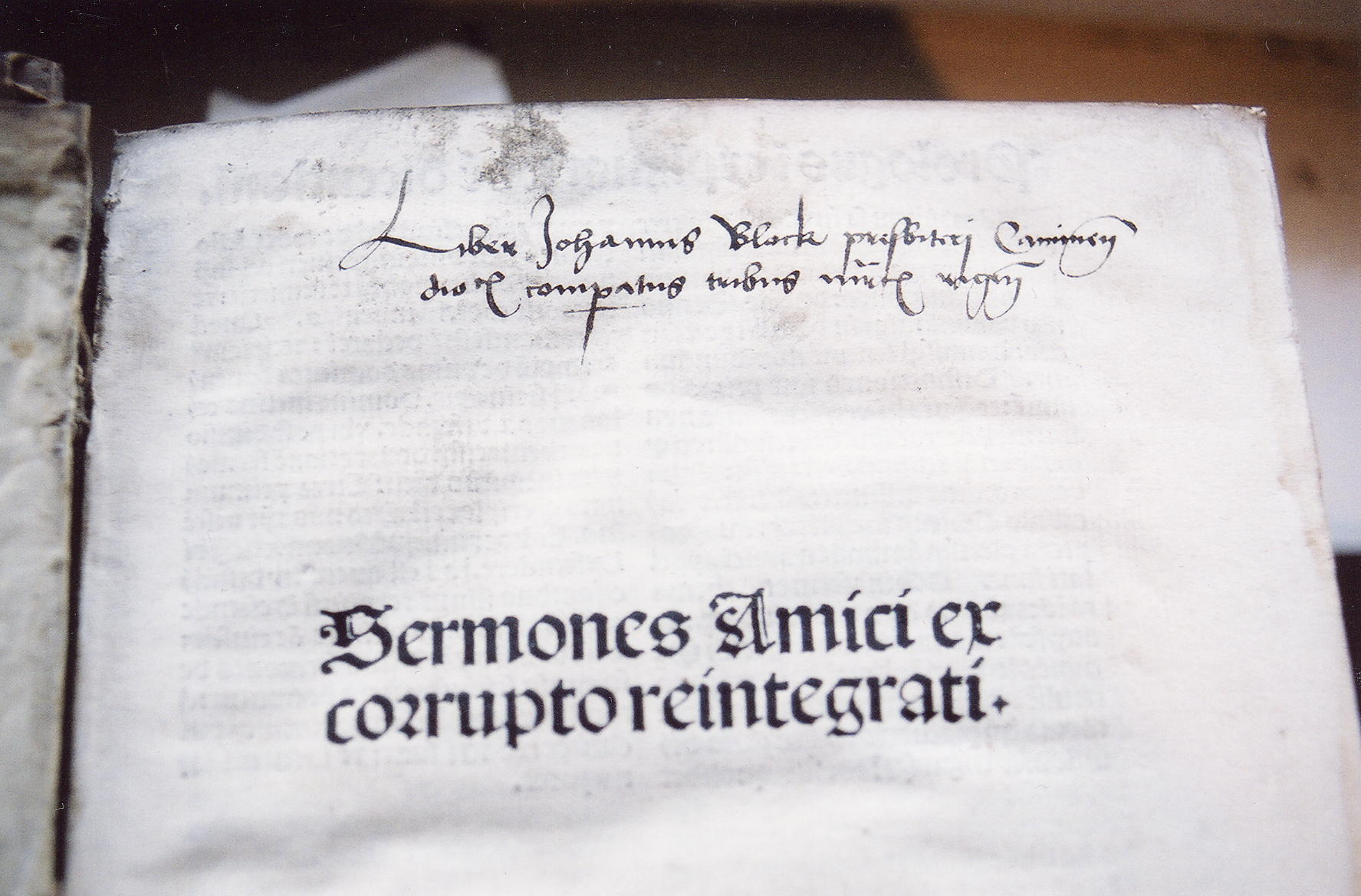 Handschriftlicher Besitzvermerk in einem der Bücher aus der Bibliothek des Johannes Block